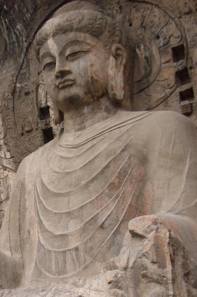 Buddha Vairocana (7. Jh.) Longmen, China Aufnahmedatum: Mai 2005